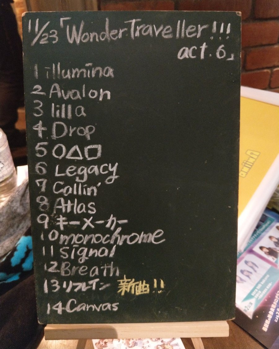 amiinAセトリボード(20171123(1))